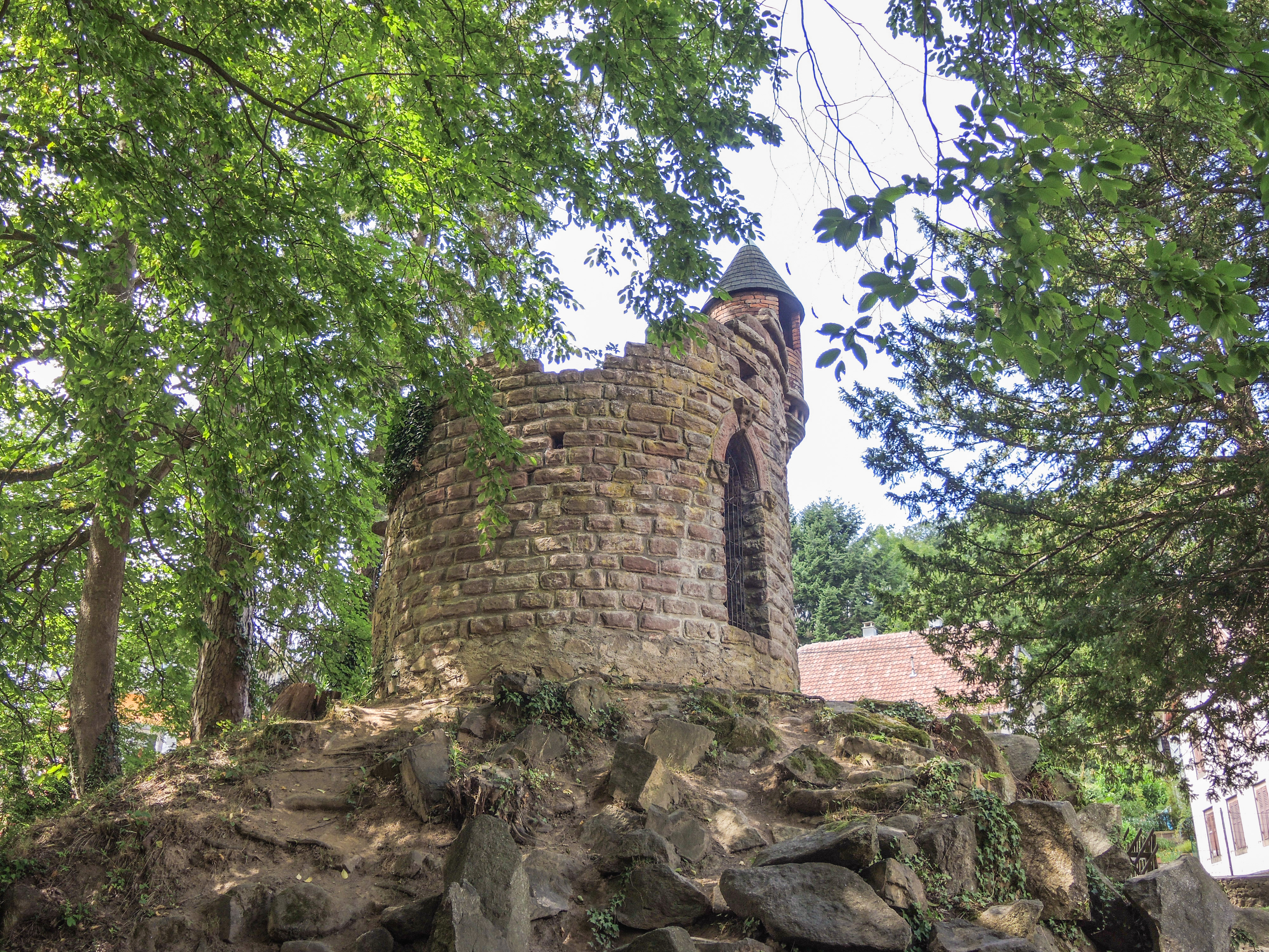 Ancienne glacière, dans le parc municipal d'Orbey. Haut-Rhin